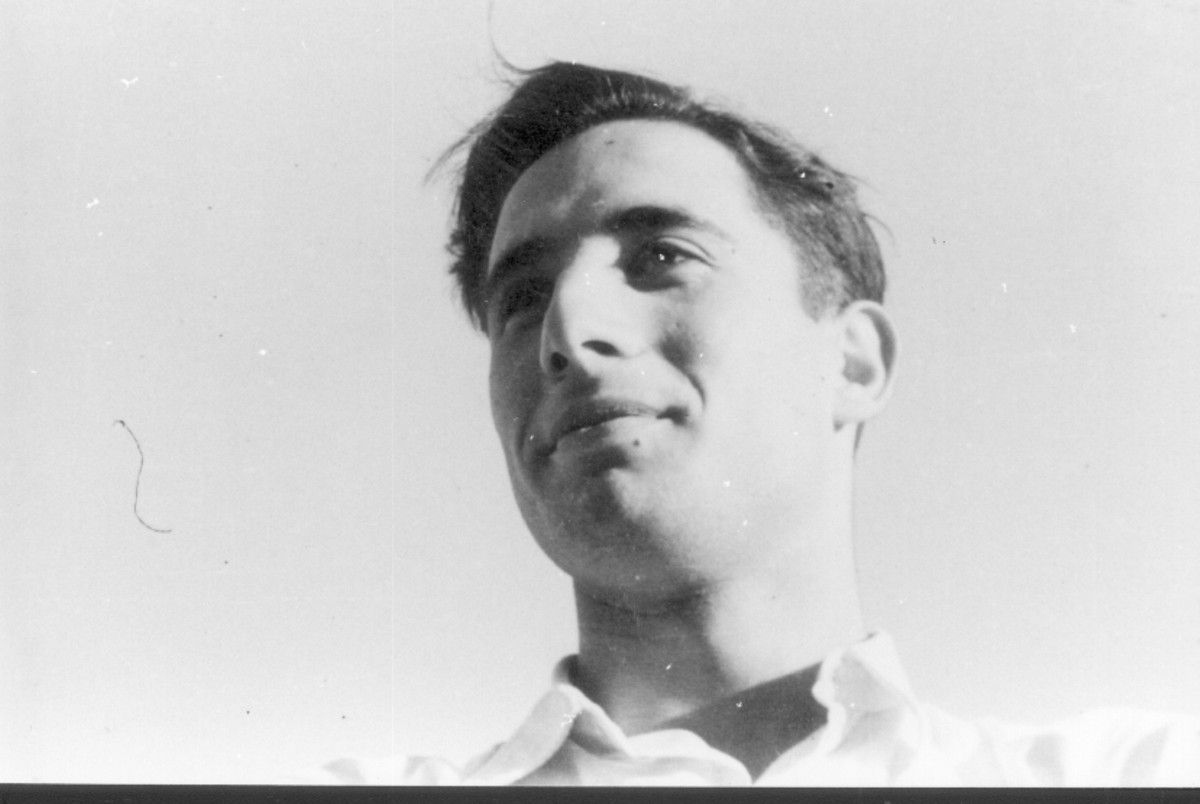 חטיבת יפתח - הגדוד השלישי - הכשרות - 9 - הכשרת הצופים ד' עין-גב - בעין-גב. ישראל (אבונה) גורלניק.